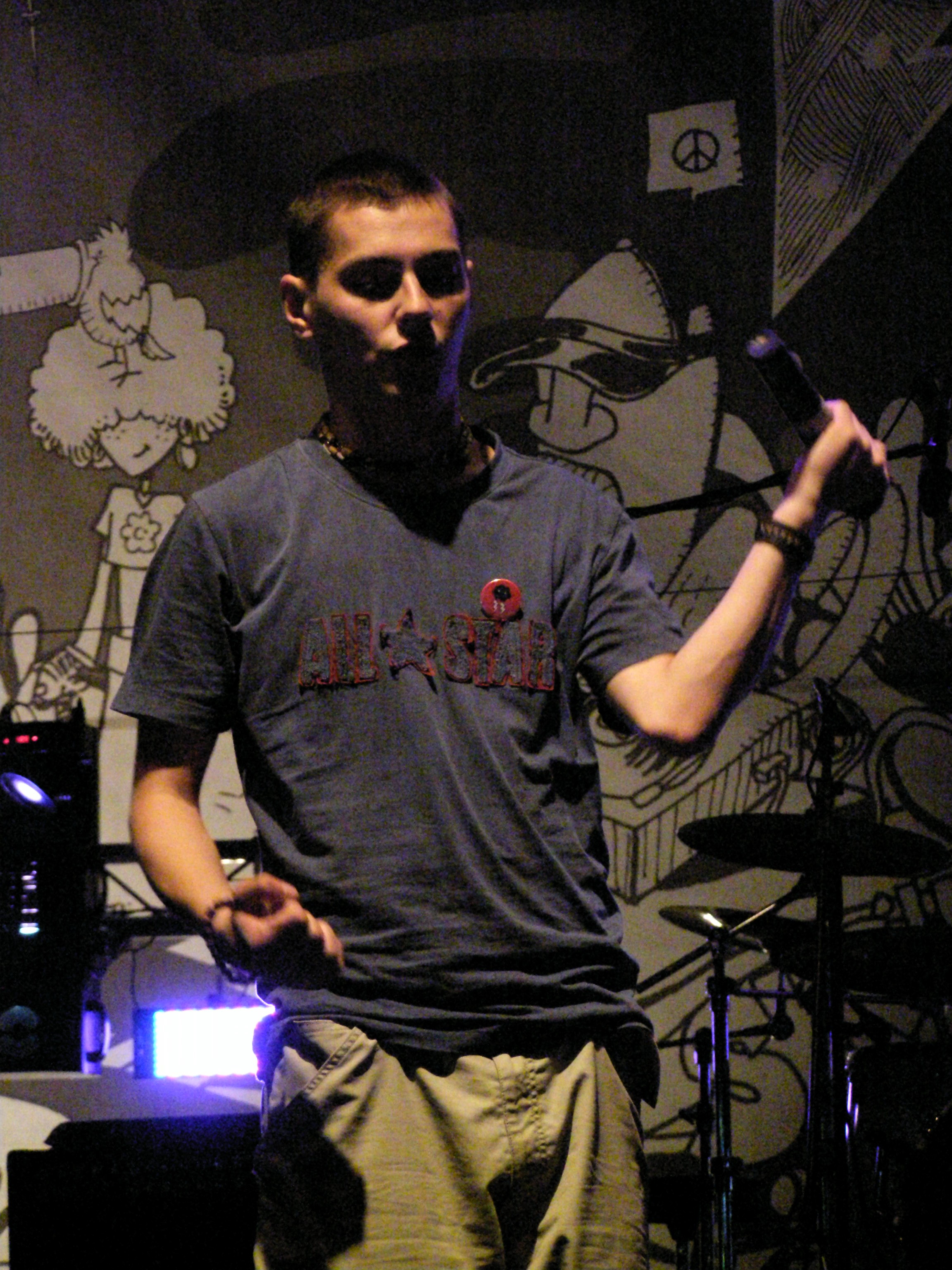 Marčelo 2008